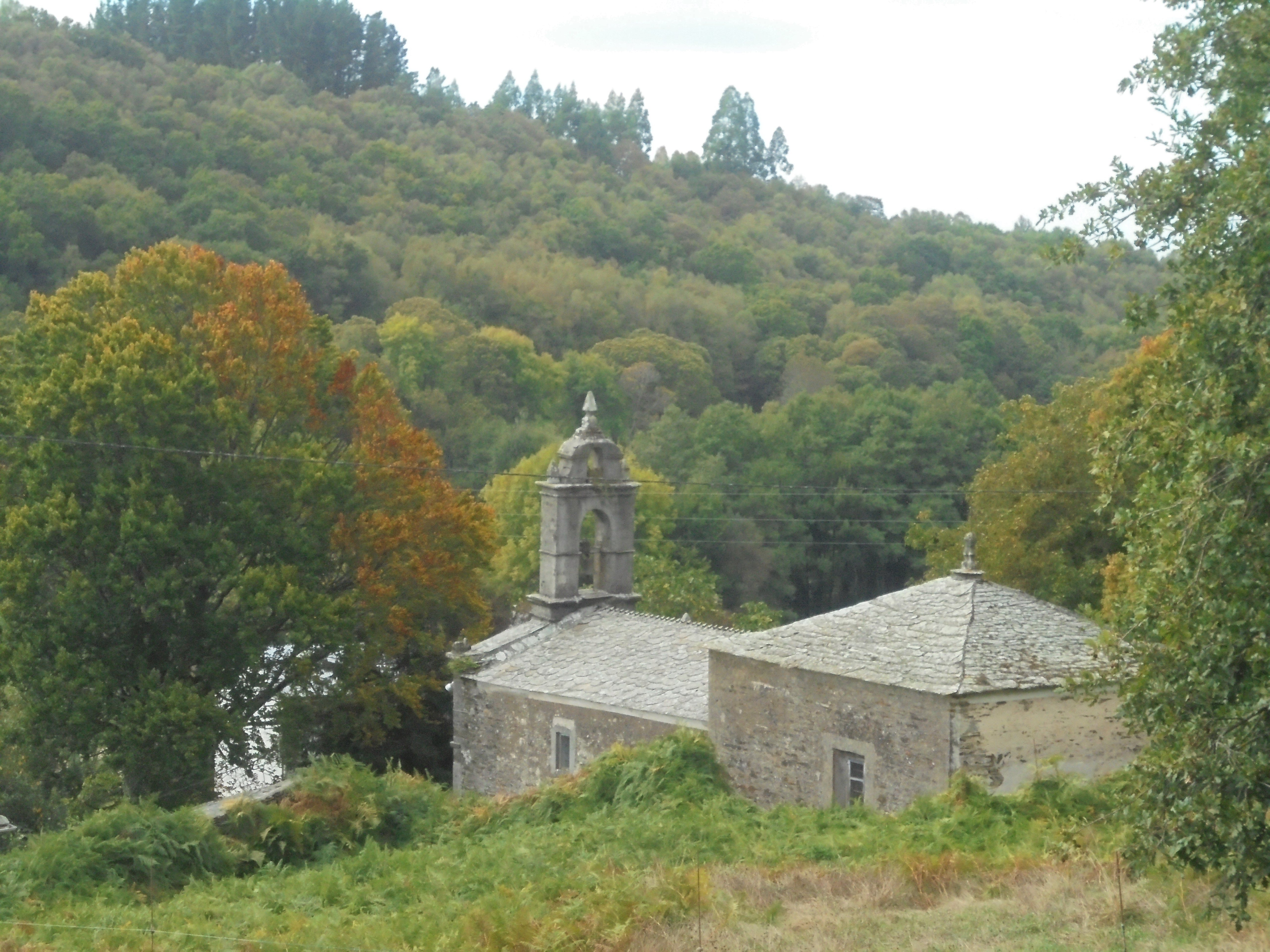 Igrexa parroquial de Gondel ( Pol)